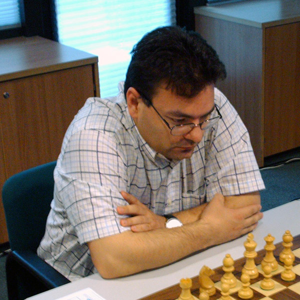 GM Slavko Cicak, Utrecht 2007